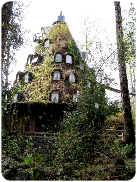 Hotel Montaña Magica en el Parque Huilo Huilo en la Region de Los Rios